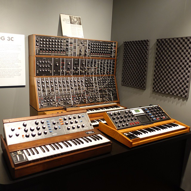 “…うおー、タンスだ。USPTOにタンス、USPTOにタンス、U S P T O に タ ン ス ！ うおー。”